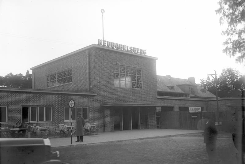 Ein neuer Bahnhof in Neubabelsberg ! Das moderne Bahnhofsgebäude des an der Wannseebahn gelegenen Bahnhofs Neubabelsberg.